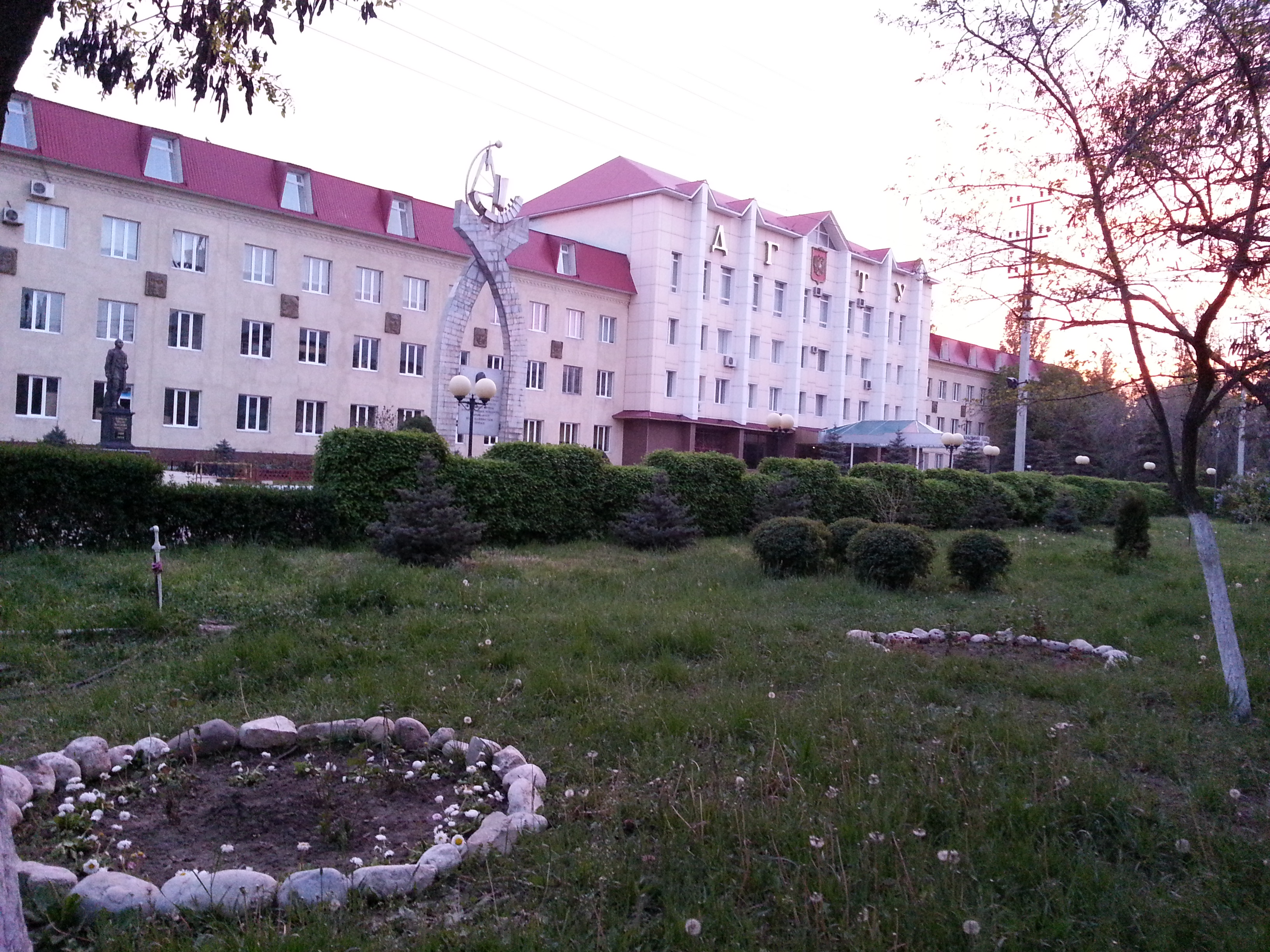 Дагестанский Государственный Технический Университет